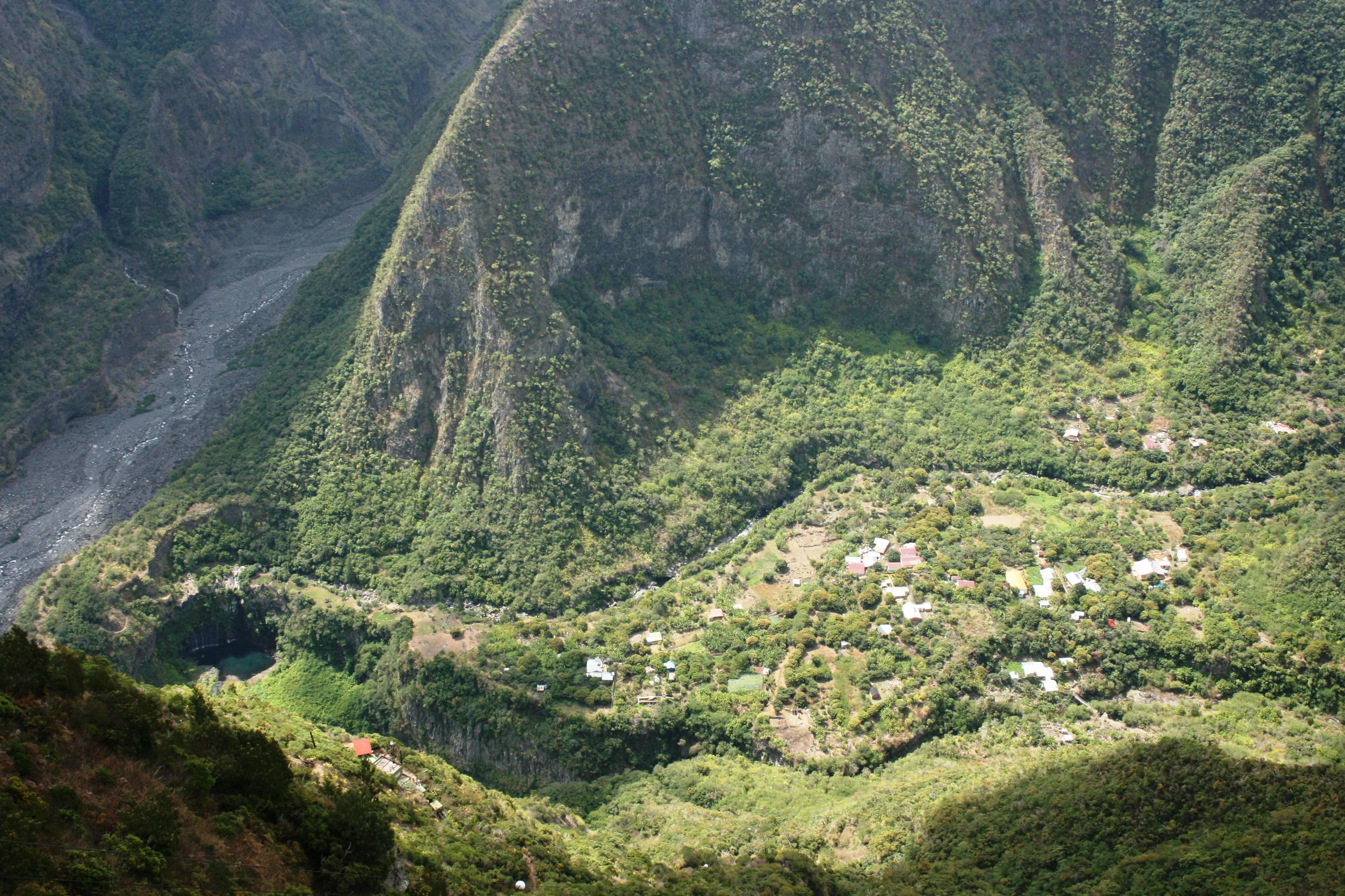 Vue de Grand Bassin depuis Bois Court, au Tampon, à La Réunion.